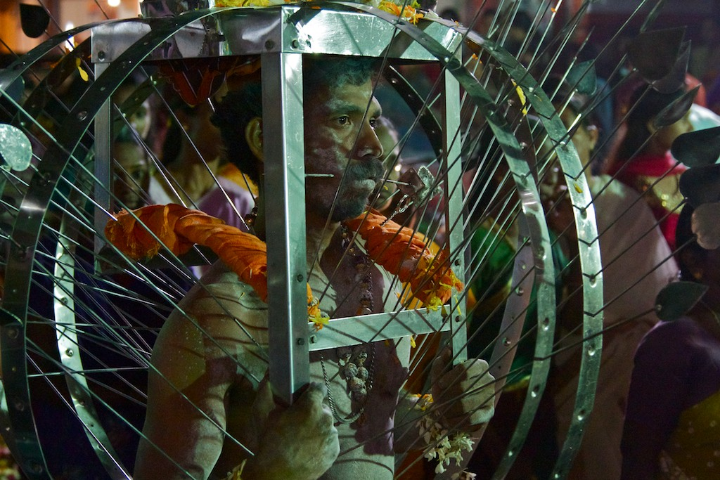 Hindu festival